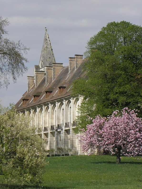 Vue méridionale de l'abbaye de Longpont (02).